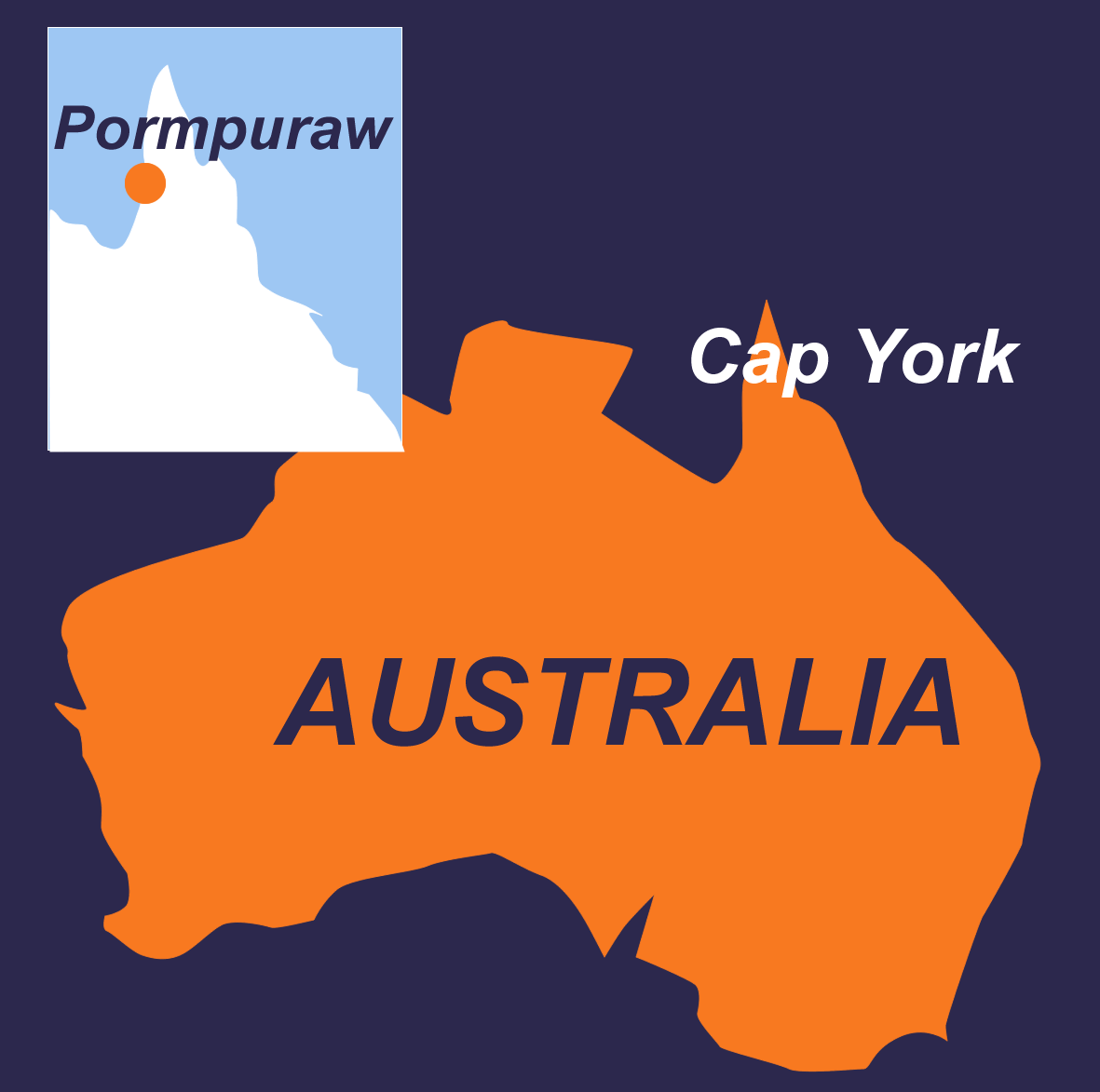 Carte de situation de Pormpuraw